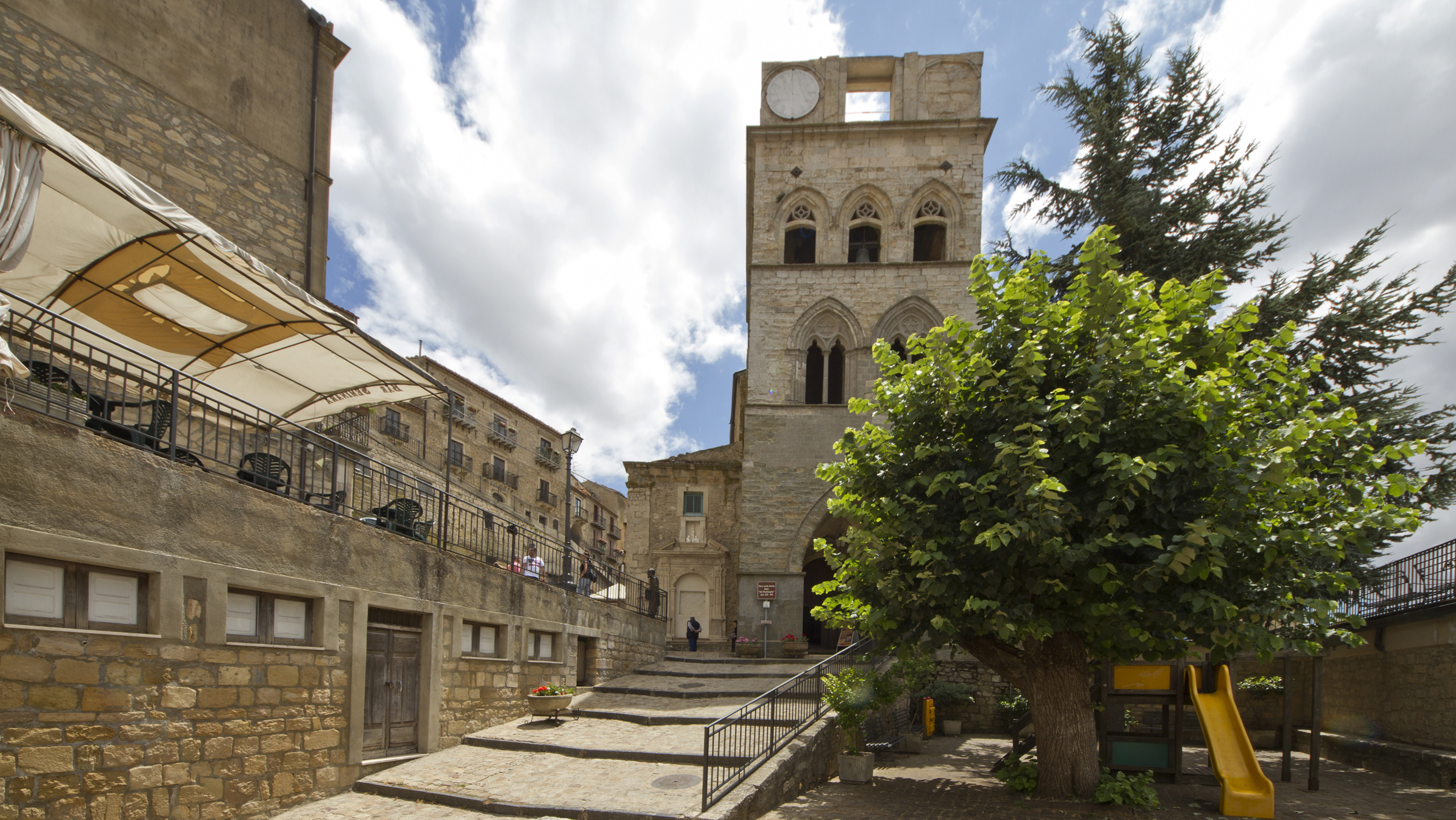 90024 Gangi PA, Italy